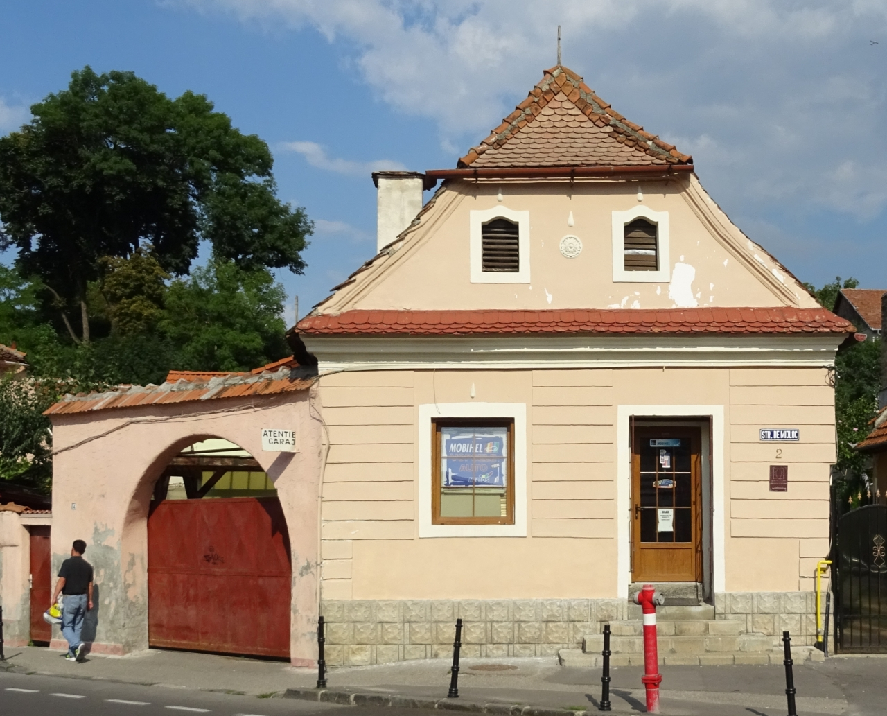 Casă veche